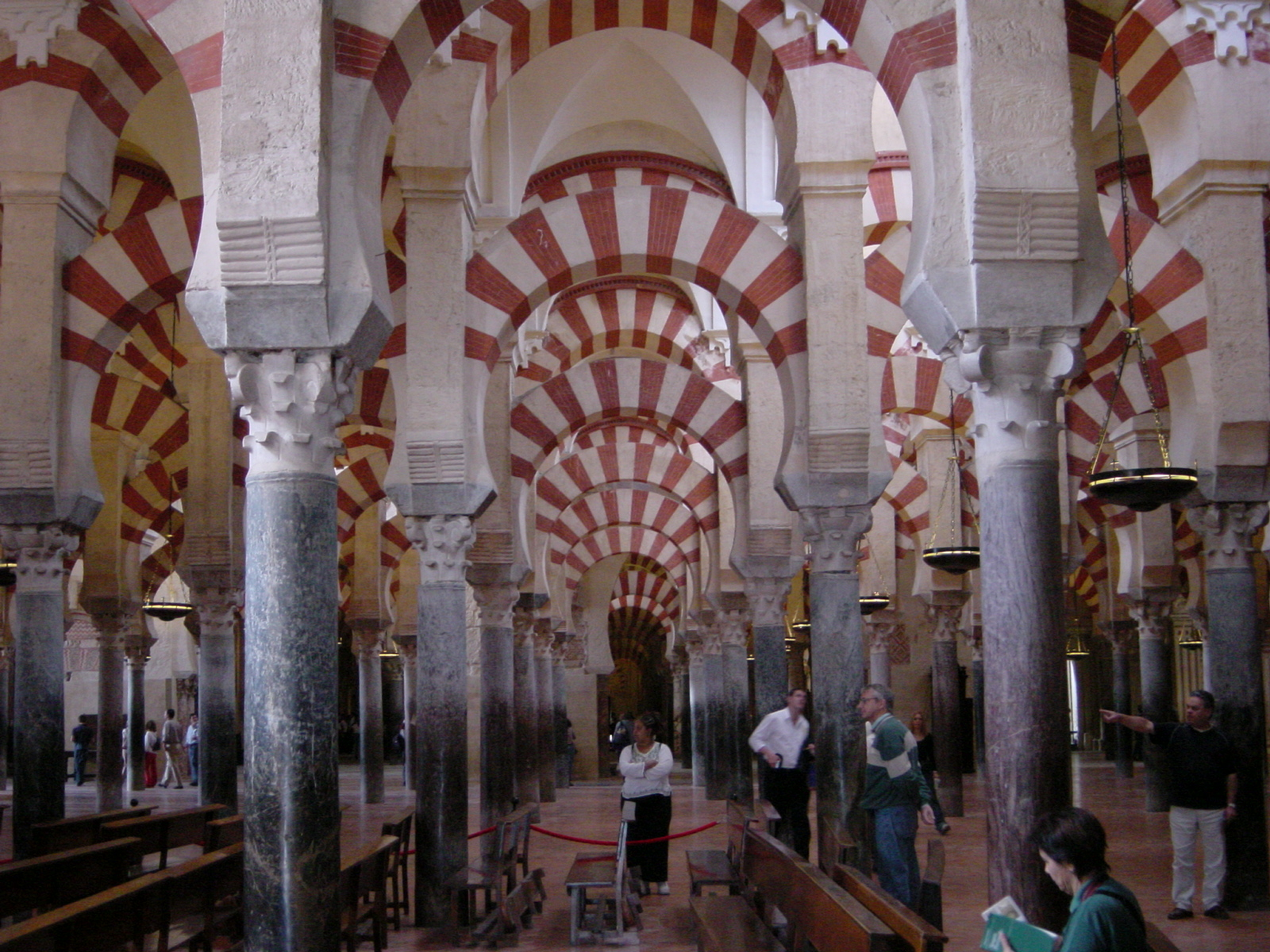 Mezquita de Córdoba